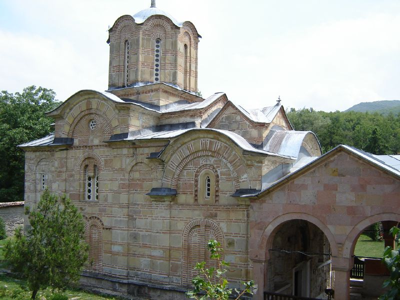 Църквата на Марковия манастир, Република Македония.